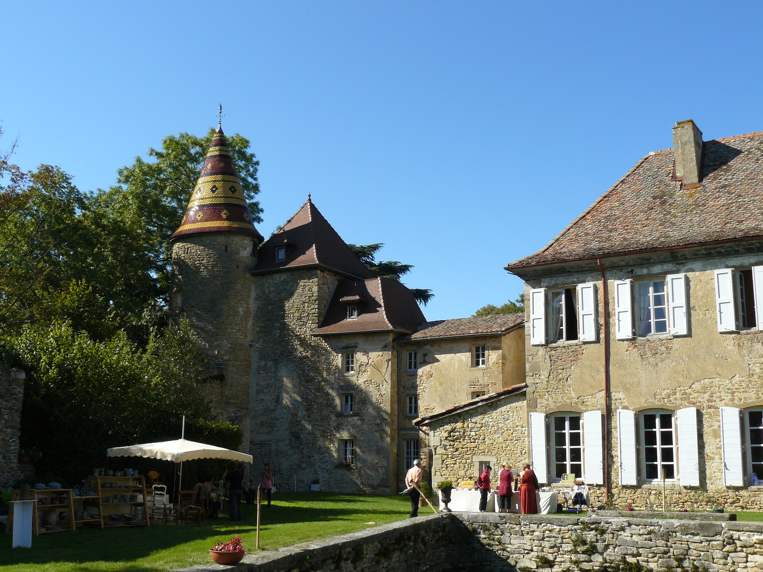 Château de Vallin (XIVe - XVIIe) à St-Victor-de-Cessieu (Isère)